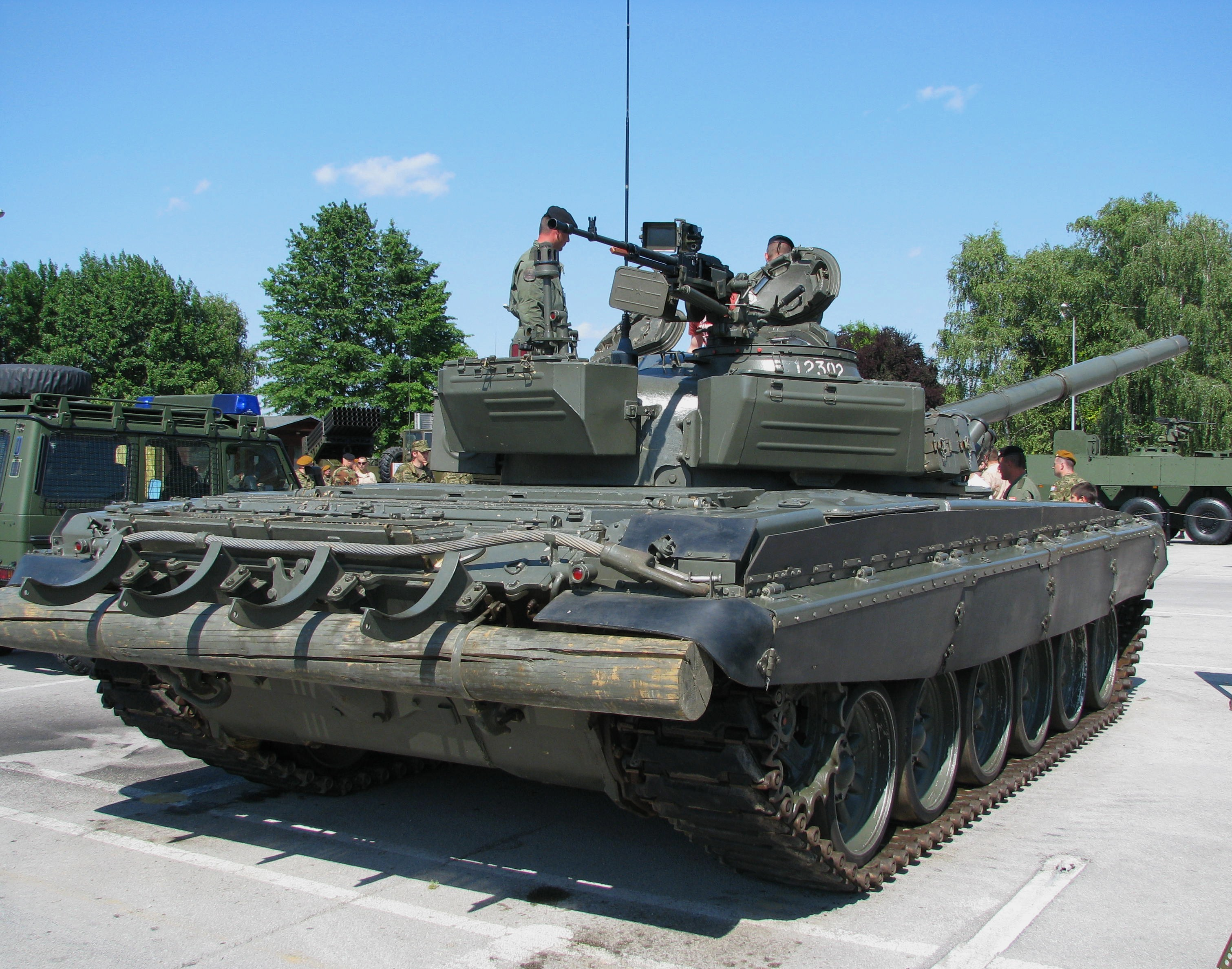 Tenk M-84